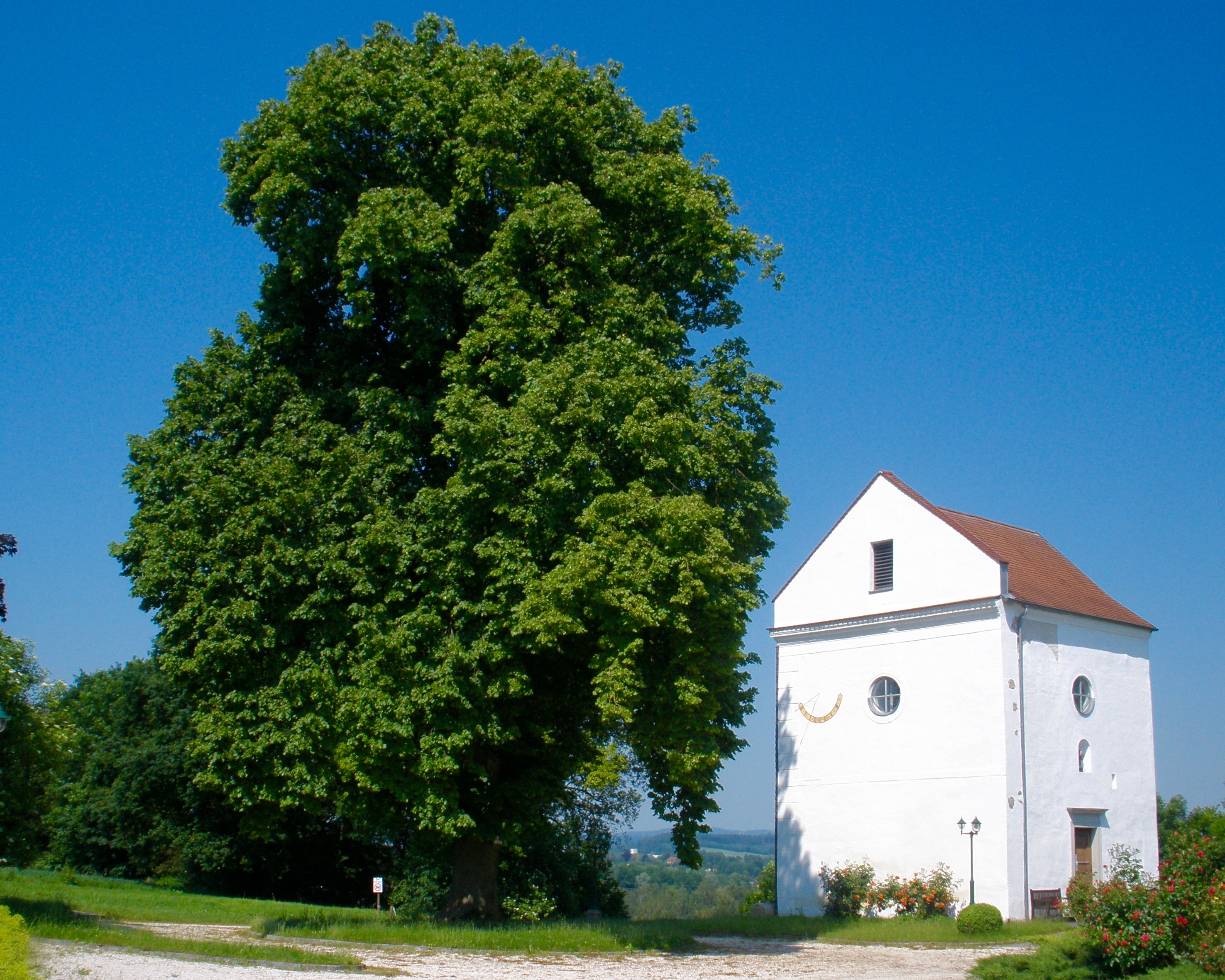 Kaiser-Linde vor der Schlosskapelle Mitterberg in Rüstorf (gepflanzt 1908).